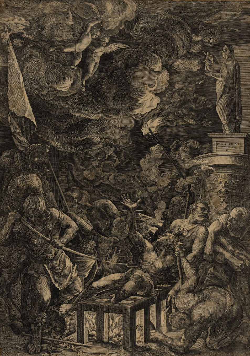 CORT, Cornelis, fl. 1535-1578 [São Lourenço] [S.l. : s.n., 1571]. - 1 gravura : água-forte e buril, p&b . - Dim. da comp.: 48x34,5 cm